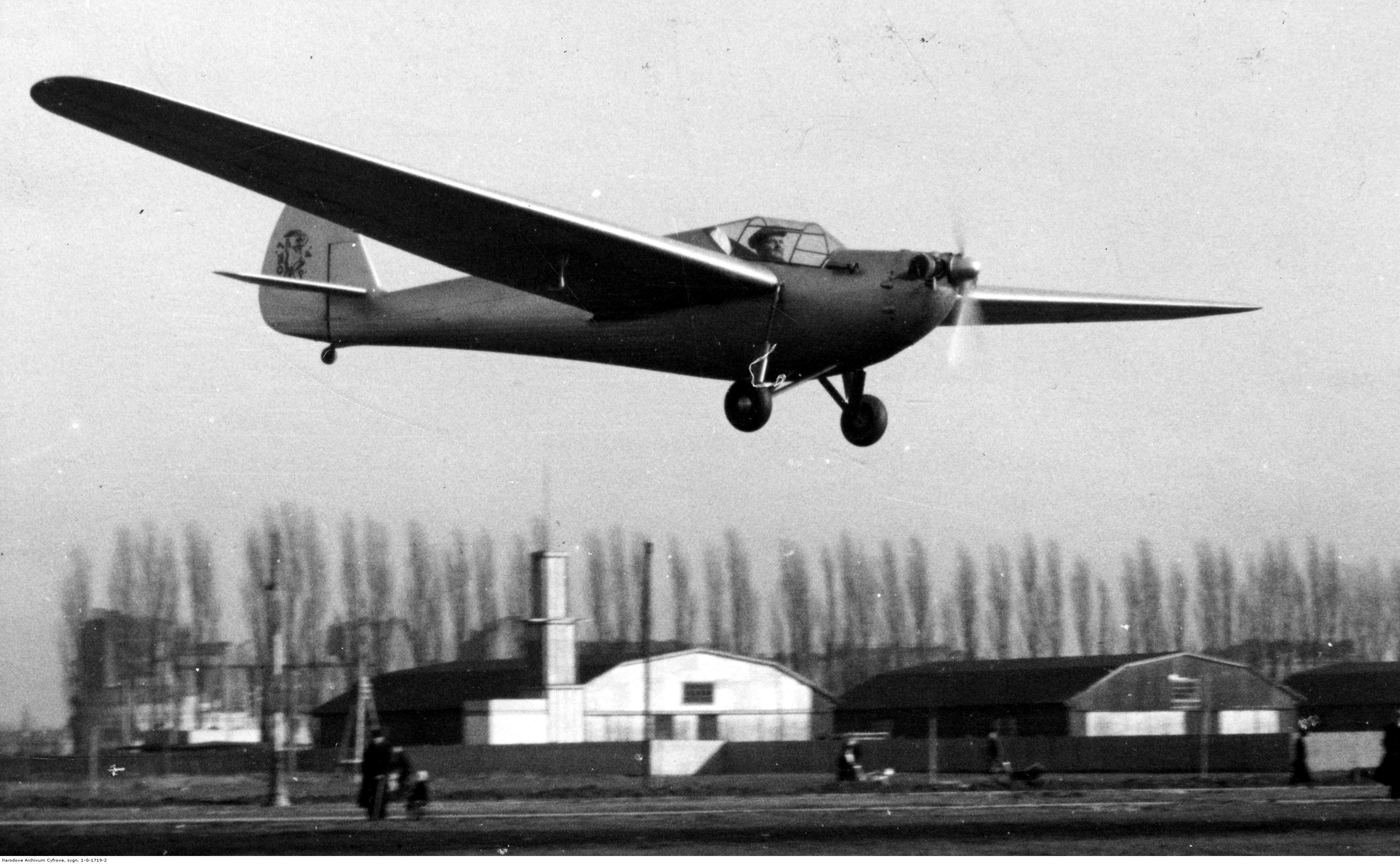 Motoszybowiec Bąk na lotnisku mokotowskim